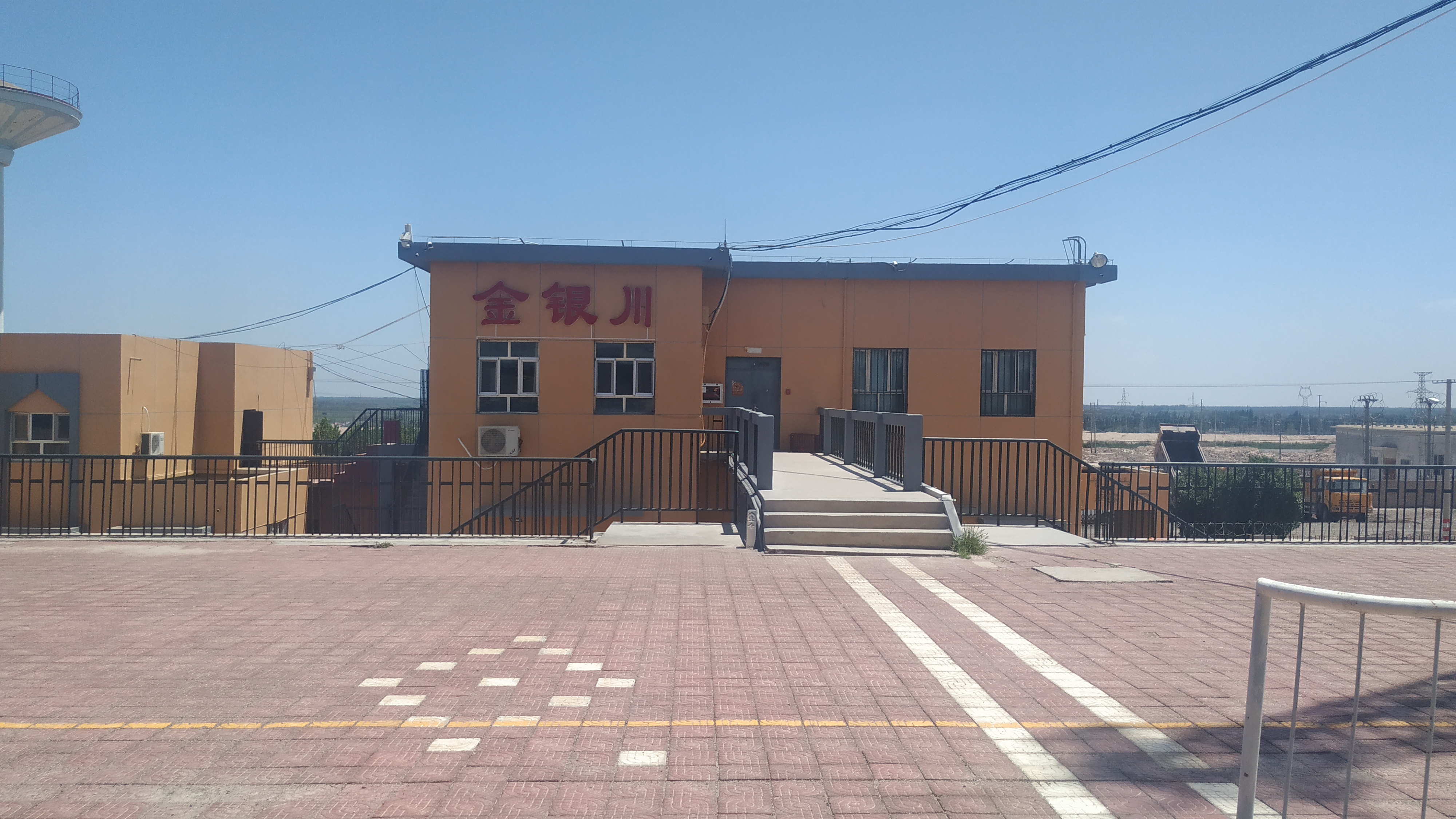 中文（中国大陆）: 金银川站站房